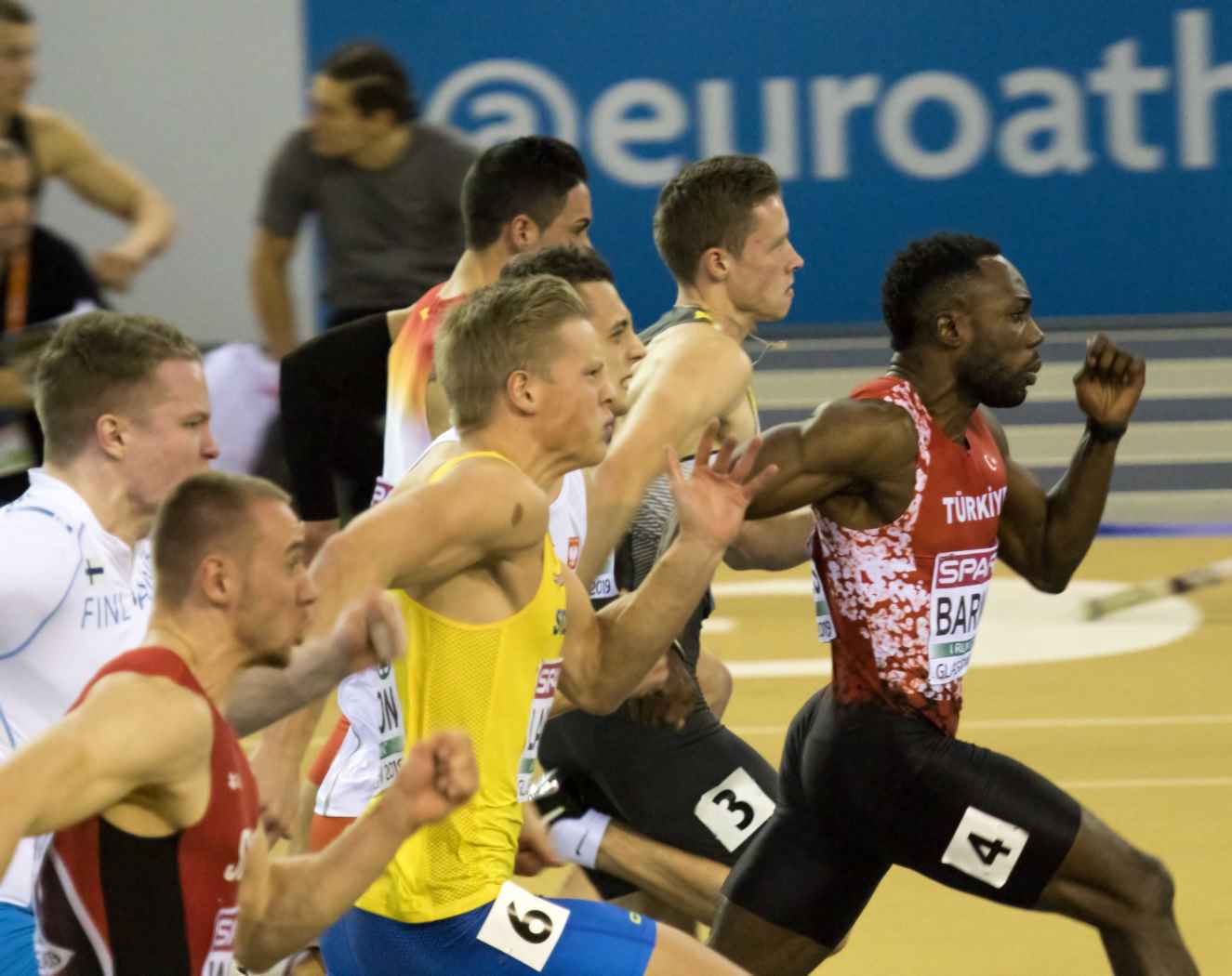 EKI20410 halve finale 60m man